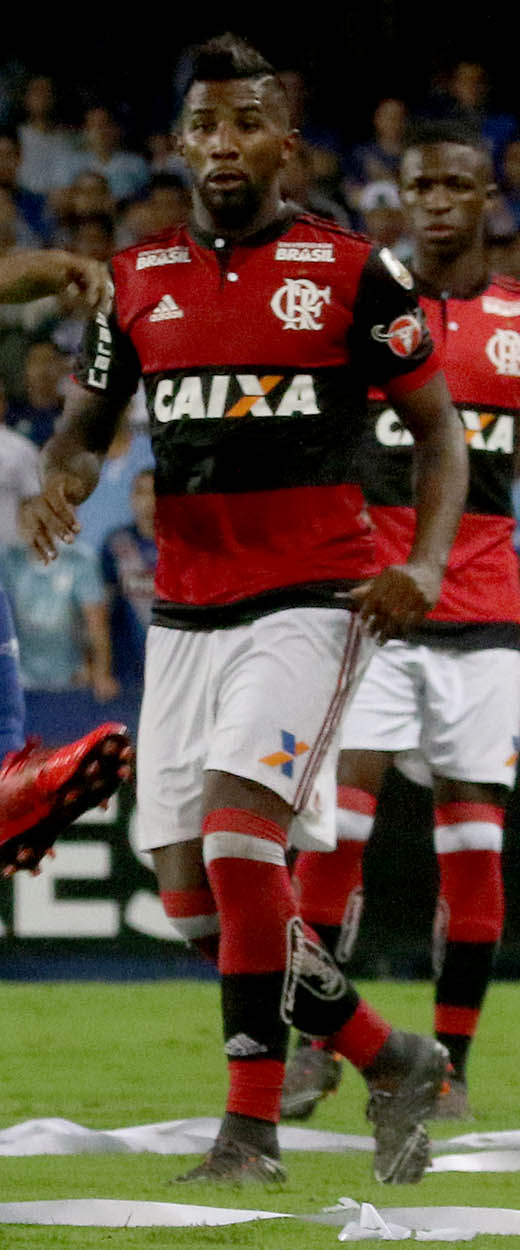 Guayaquil, miércoles 14 de marzo del 2018 (Andes).-En el estadio Capwell en Guayaquil, Emelec enfrenta a Flamengo de Brasil en la segunda fecha del grupo D de la Copa Libertadores. Foto:Andes/César Muñoz